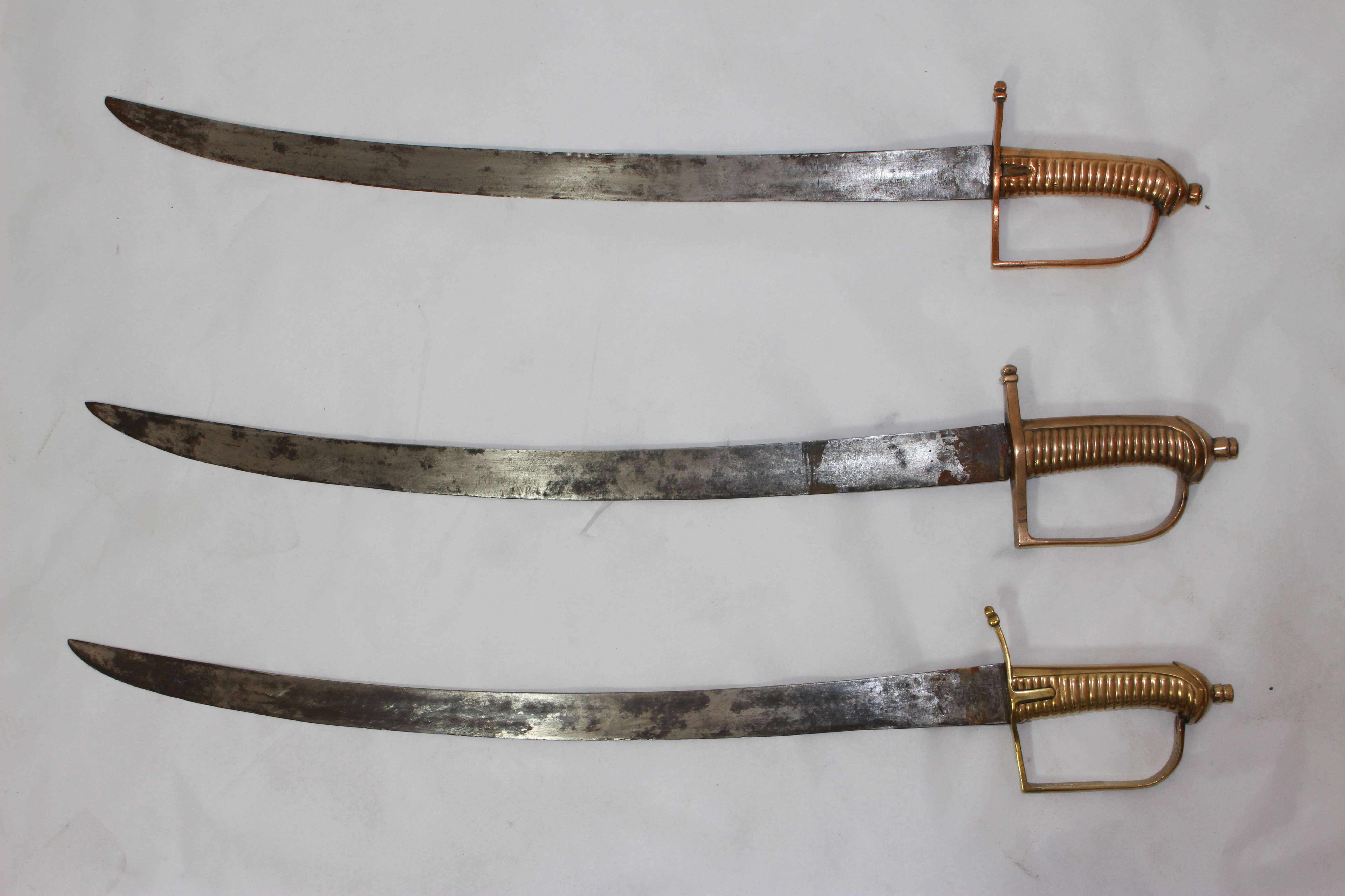 Sabres d'honneur des gardes de l’Hôpital de la Charité de Lyon ; Propriété du Musée des Hospices civils de Lyon